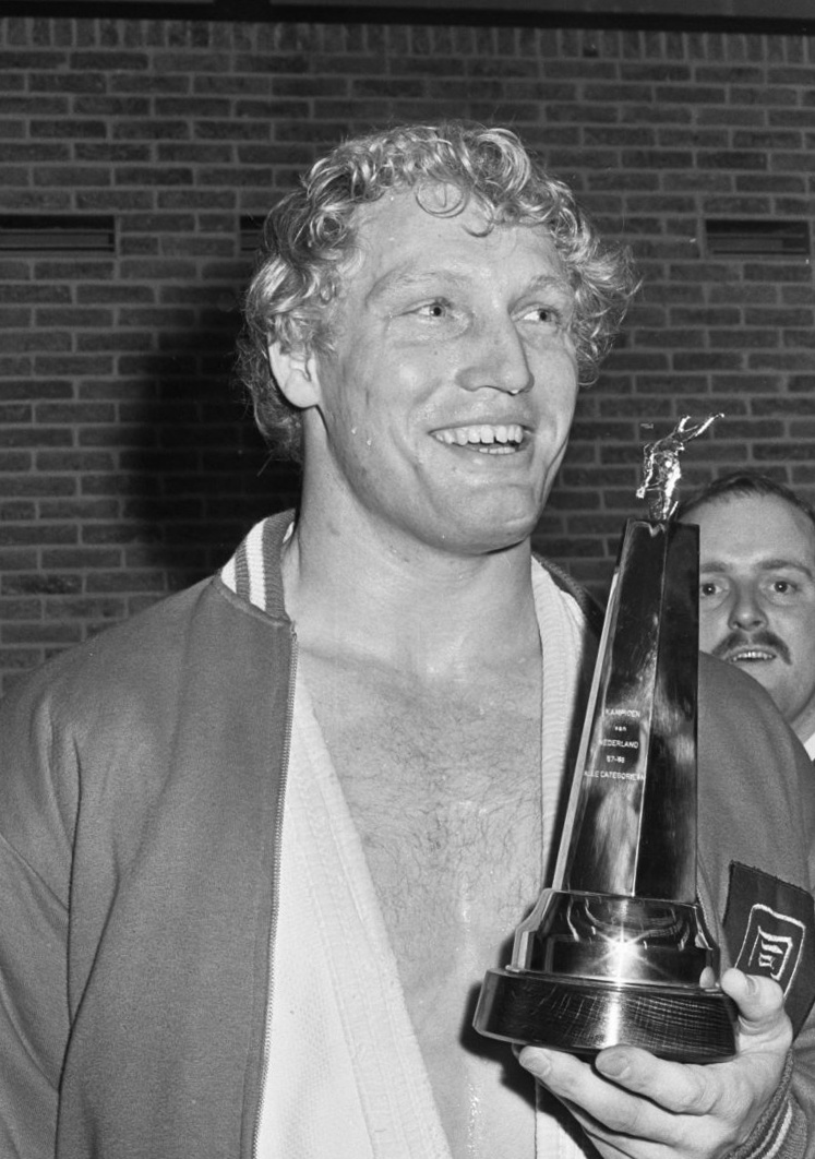 Judo Nederlandse kampioenschappen alle categorieen. Wim Ruska met beker